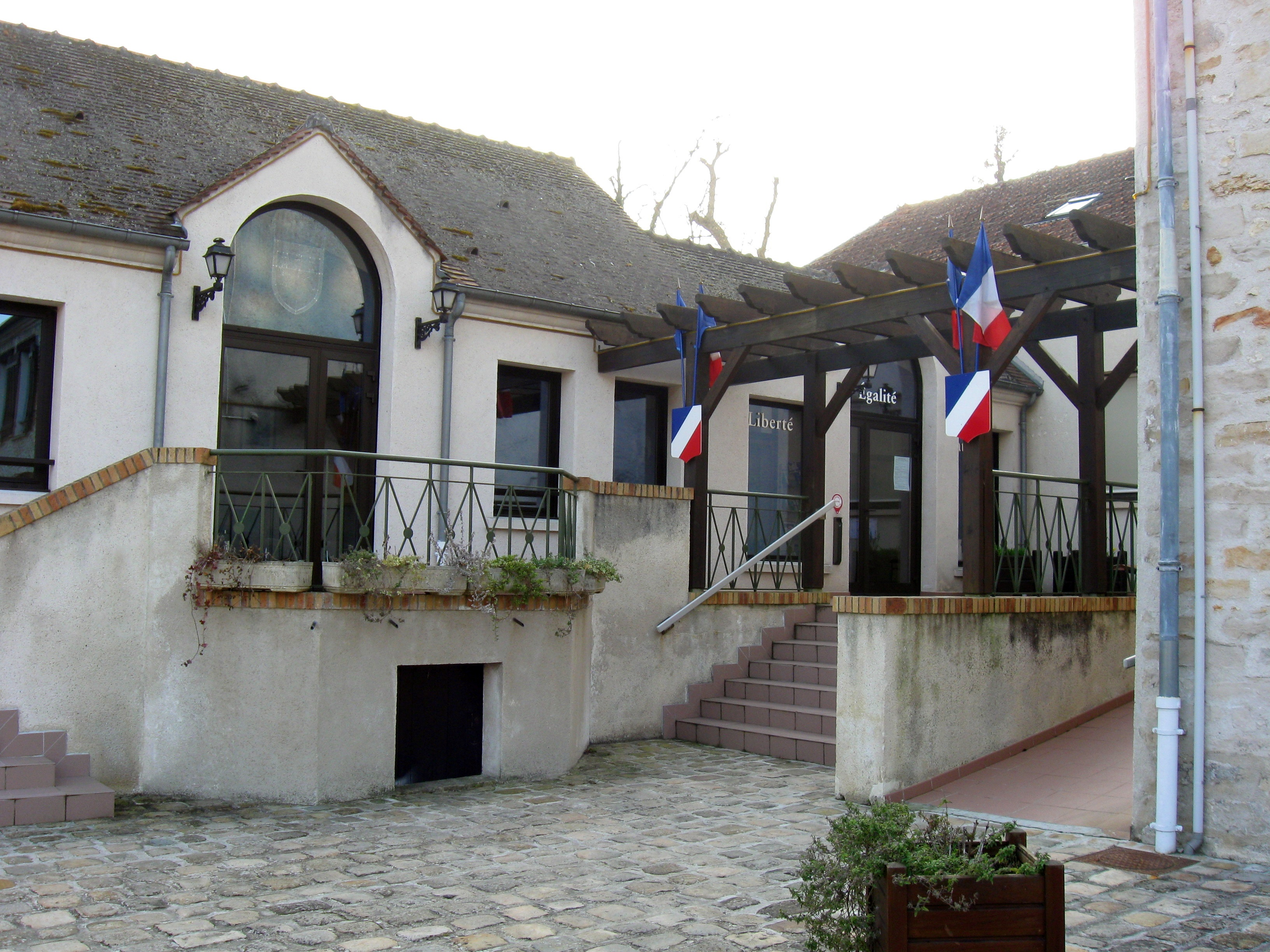 Mairie de Rubelles. (Seine-et-Marne, région Île-de-France).